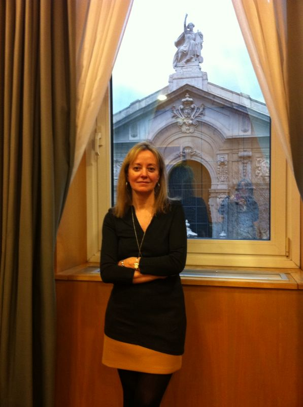 Clara Martinez de Careaga, en su despacho del Consejo General del Poder Judicial, frente al Tribunal Supremo.